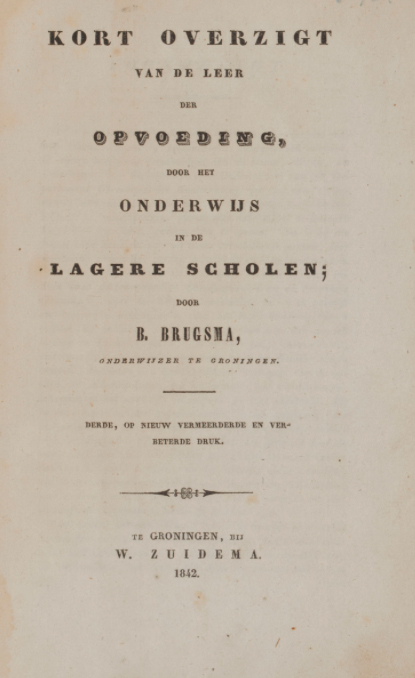 Titelpagina derde druk uit 1842 van "‘Kort overzigt van de leer der opvoeding, door het onderwijs in de lagere scholen" door Berend Brugsma